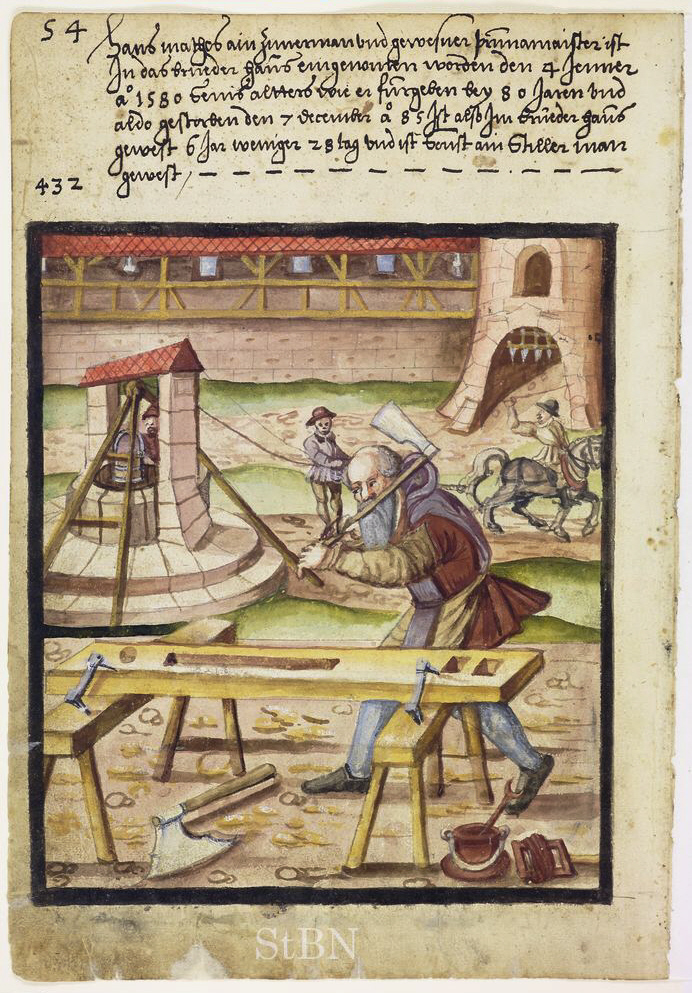 Hans mathes (Mathes; Matthes), Zimerman; Prunnamaister (Zimmermann; Brunnenfeger; Brunnenmeister) Transkription und weitere Informationen